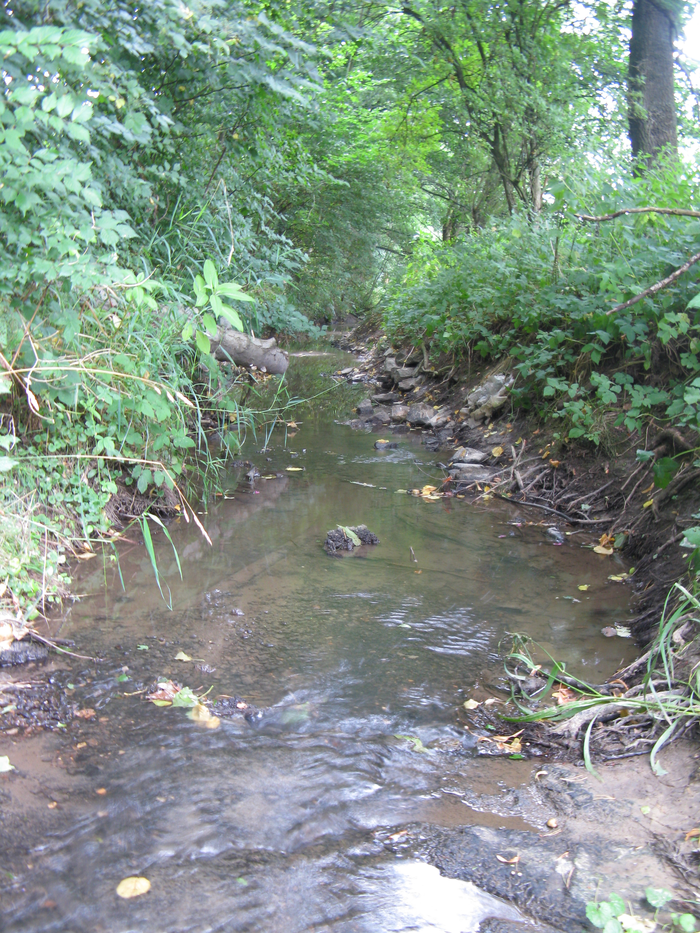 Der Bentgraben